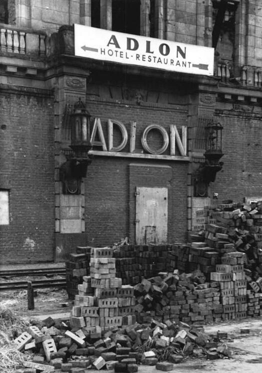 Berlin, Unter den Linden, Hotel "Adlon" Illus Kümpfel 13.2.50 Weltbekannte Berliner Hotels. Die großen Berliner Hotels haben den Krieg nicht überstanden und heute, 5 Jahre nach dem krieg, zeigen nur noch Ruinenfragmente und Trümmer an, wo früher einmal große Gebäude Reisenden aus allen Teilen der Welt Unterkunft gewährten. UBz: "Adlon" Unter den Linden. 5372-50